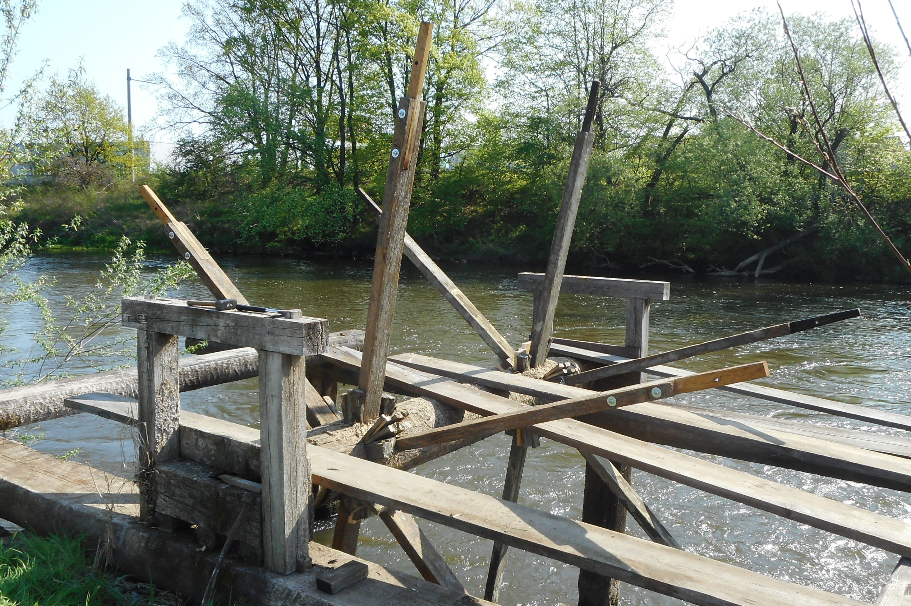 Je 3 Arme auf beiden Seiten der Welle, als Speichen für die 2 Radkränze.